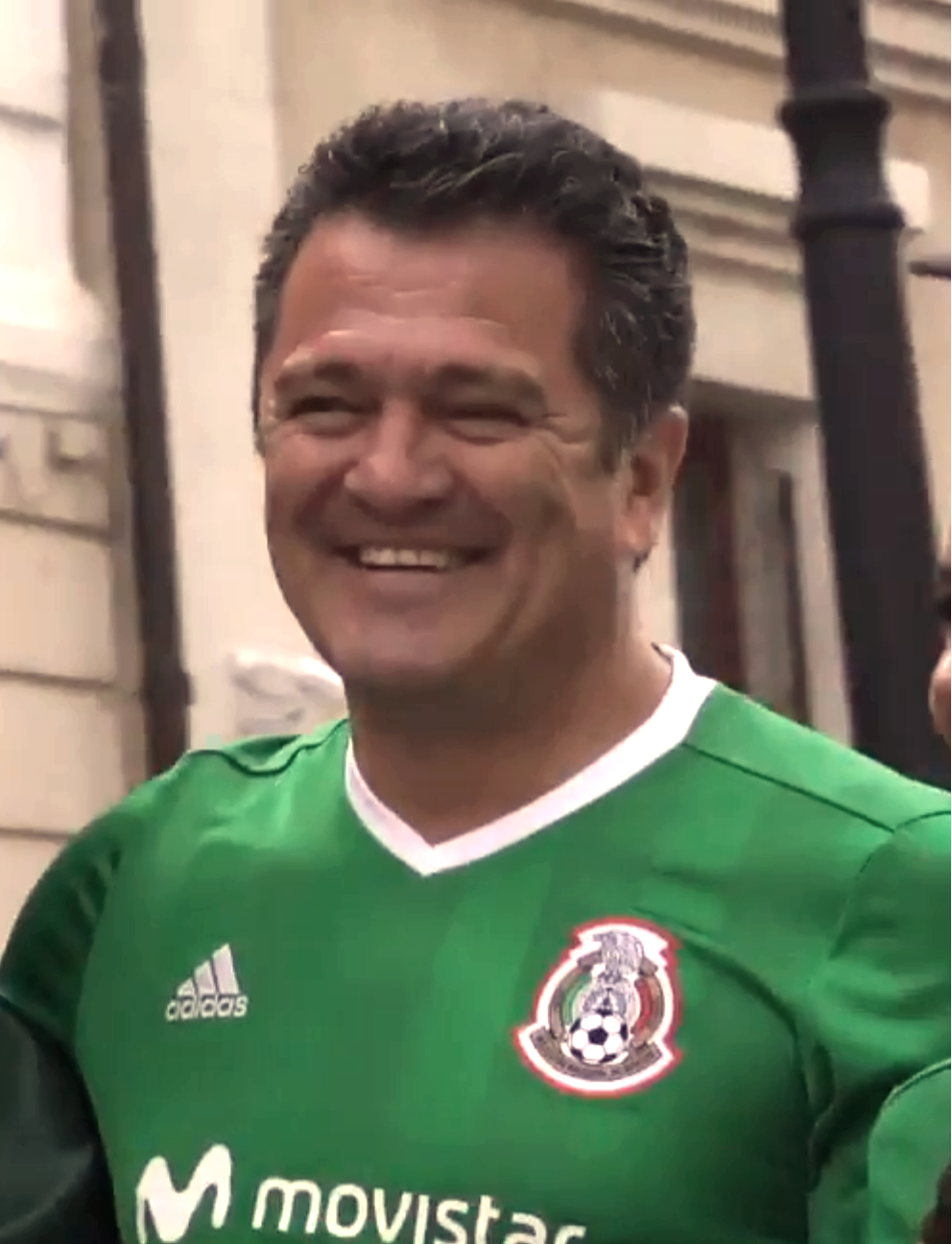 Carlos Hermosillo en 2017